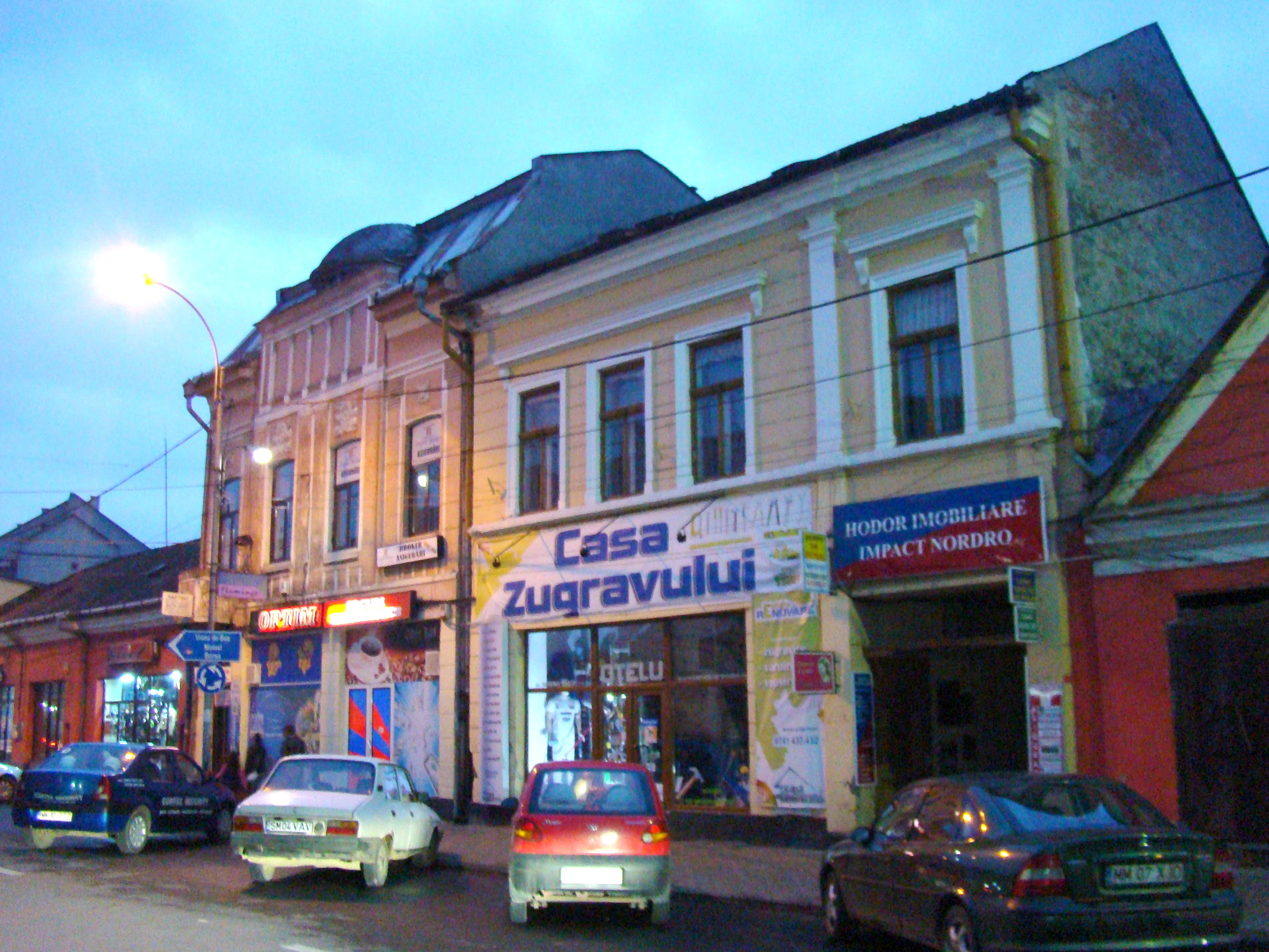 Casă, municipiul Sighetu Marmației, str.Bogdan Vodă 28